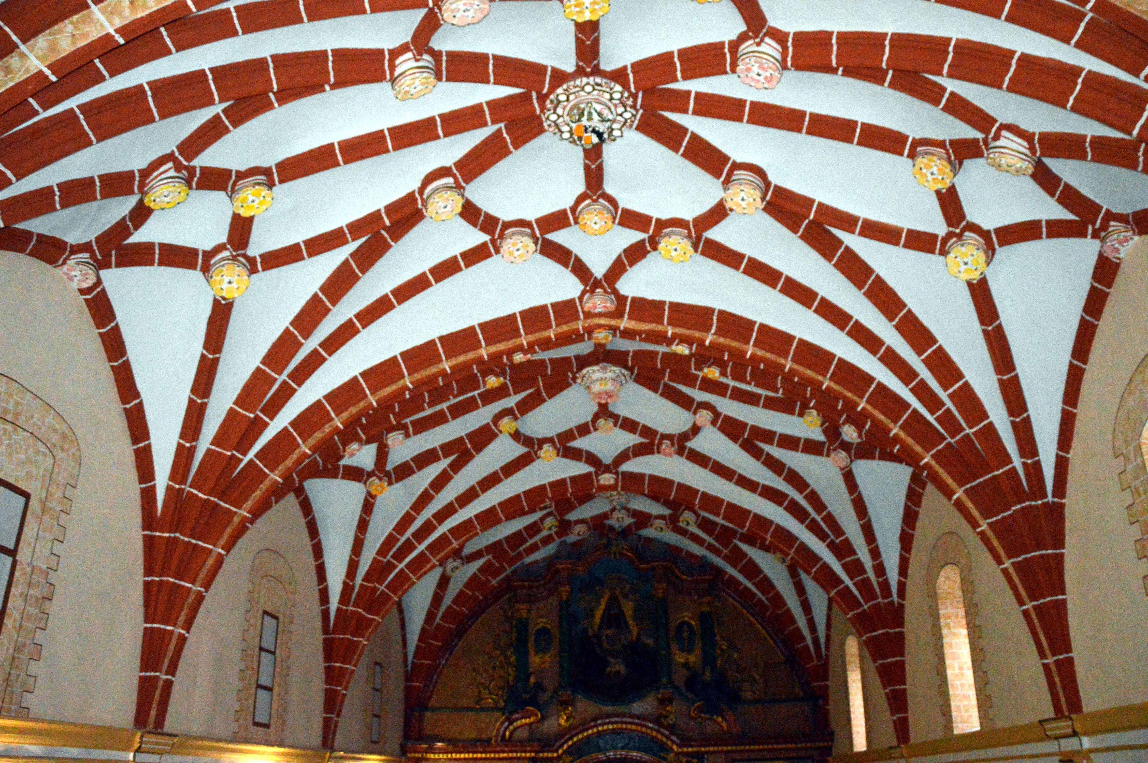 Detalle de la tracería gótica en la nave del Santuario de la Fuensanta en Villel (Teruel), con el frontal barroco del presbiterio al fondo (2019